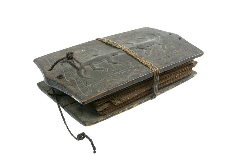 Wichelboek. Wichelboek met formules, recepten en voorschriften die worden toegepast door de priester-genezer (datu, guru). De teksten in het wichelboek handelen over de kunst van het onderhouden van het leven (o.a. recepten van medicijnen), de kunst van het vernietigen van het leven en de kunst van waarzeggerij. Het wichelboek is door de datu zelf samengesteld en geschreven. Als religieuze specalist van de Batak, maakte zijn kennis van de goden en geesten, van zwarte en witte magie, van ziekten en geneeswijzen en van de gunstige en ongunstige dagen hem tot een centrale en invloedrijke figuur in de traditionele gemeenschap. Naast het dorpshoofd was hij de belangrijkste persoon van het dorp, die geraadpleegd werd bij vragen of problemen, die bemiddelde tussen voorouders en mensen en die optrad in geval van ziekte. Hij was ook de ceremoniemeester bij plechtigheden. Daarnaast bezat de priester-genezer een kracht om aan een vijandelijk dorp schade toe te brengen (Sibeth 1991:103, 126). Het boek is versierd met twee hagedissen: boraspati genaamd. Zij symboliseren de vruchtbaarheidsgodheid van de velden (Sibeth; 2000: 40, 54). Wichelboek met formules, recepten en voorschriften, versierd met twee boraspati Unknown language: Pustaha